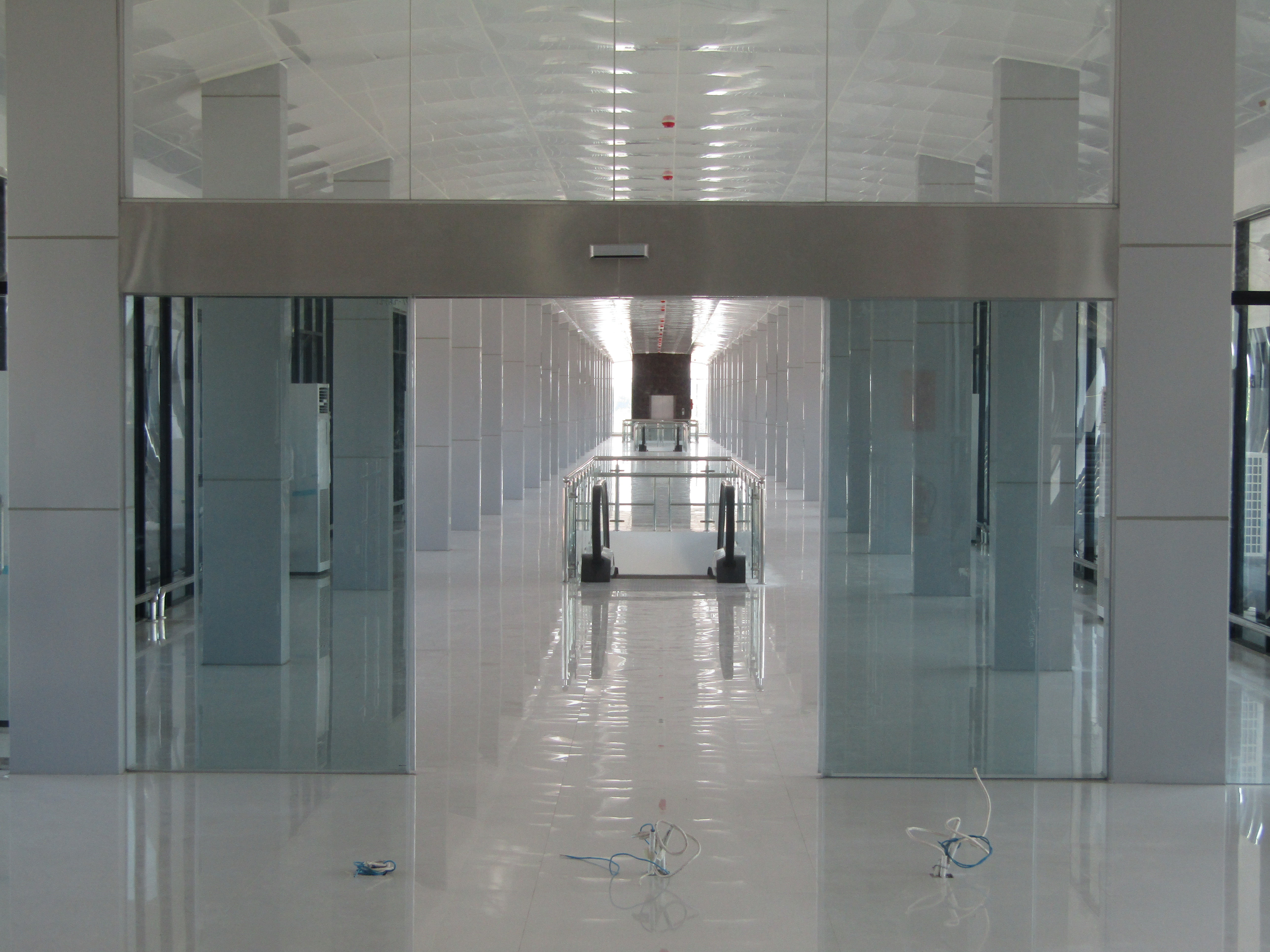 Ruang tunggu dan pintu keberangkatan KA Bandara di Stasiun Solo Balapan